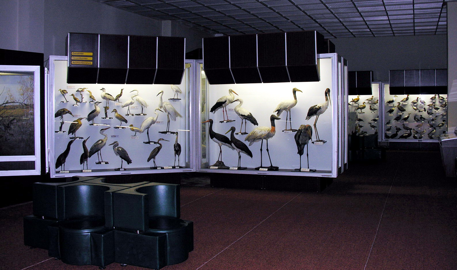 Kauno Tado Ivanausko zoologijos muziejus, 2006 m. gruodžio 2 d.